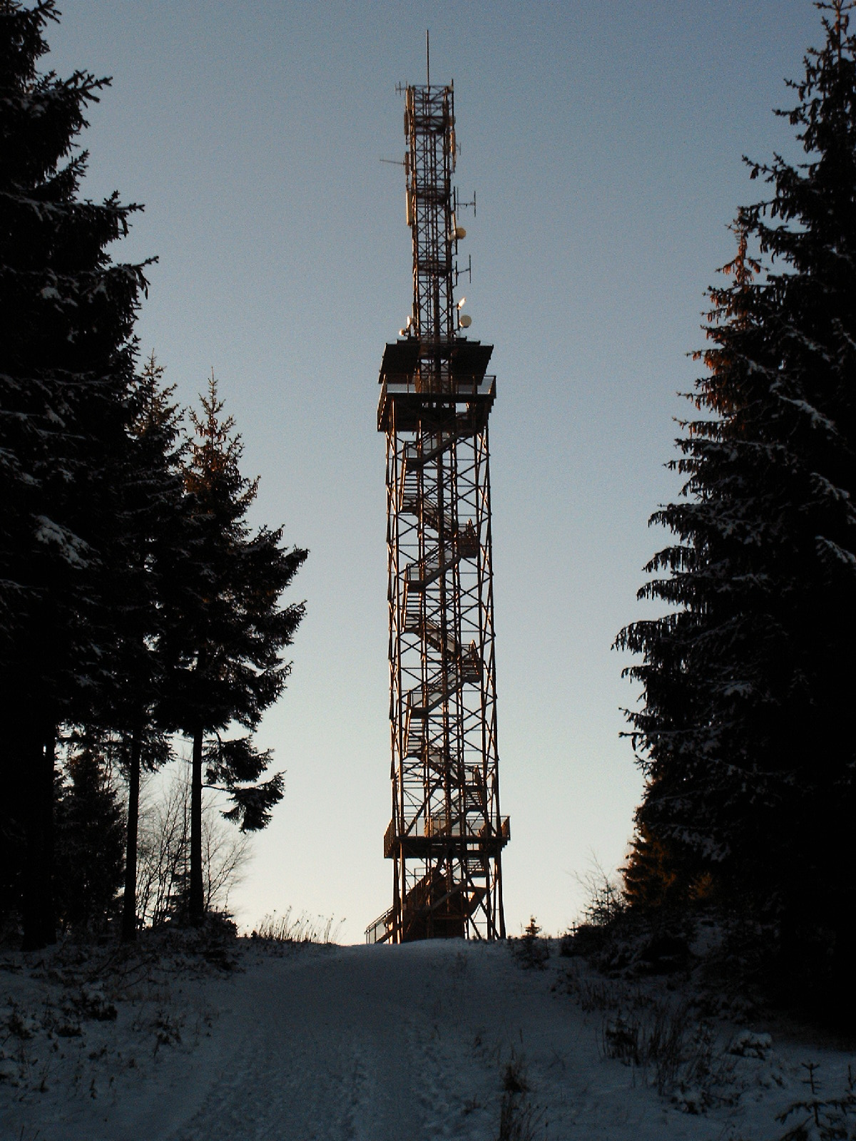 Karlshaus S.Schmitt (selbst fotografiert)